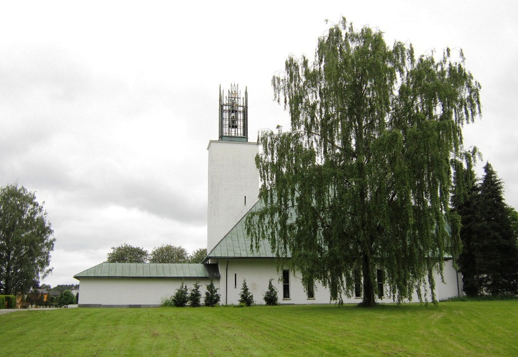 Ekeberg kapell i Sandefjord (med nedlagt krematorium)